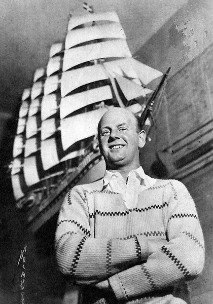 Kurt Jungstedt